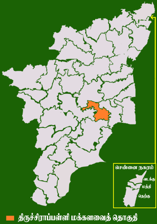 தமிழக வரைபடத்தில் உள்ள திருச்சி மக்களவைத் தொகுதி